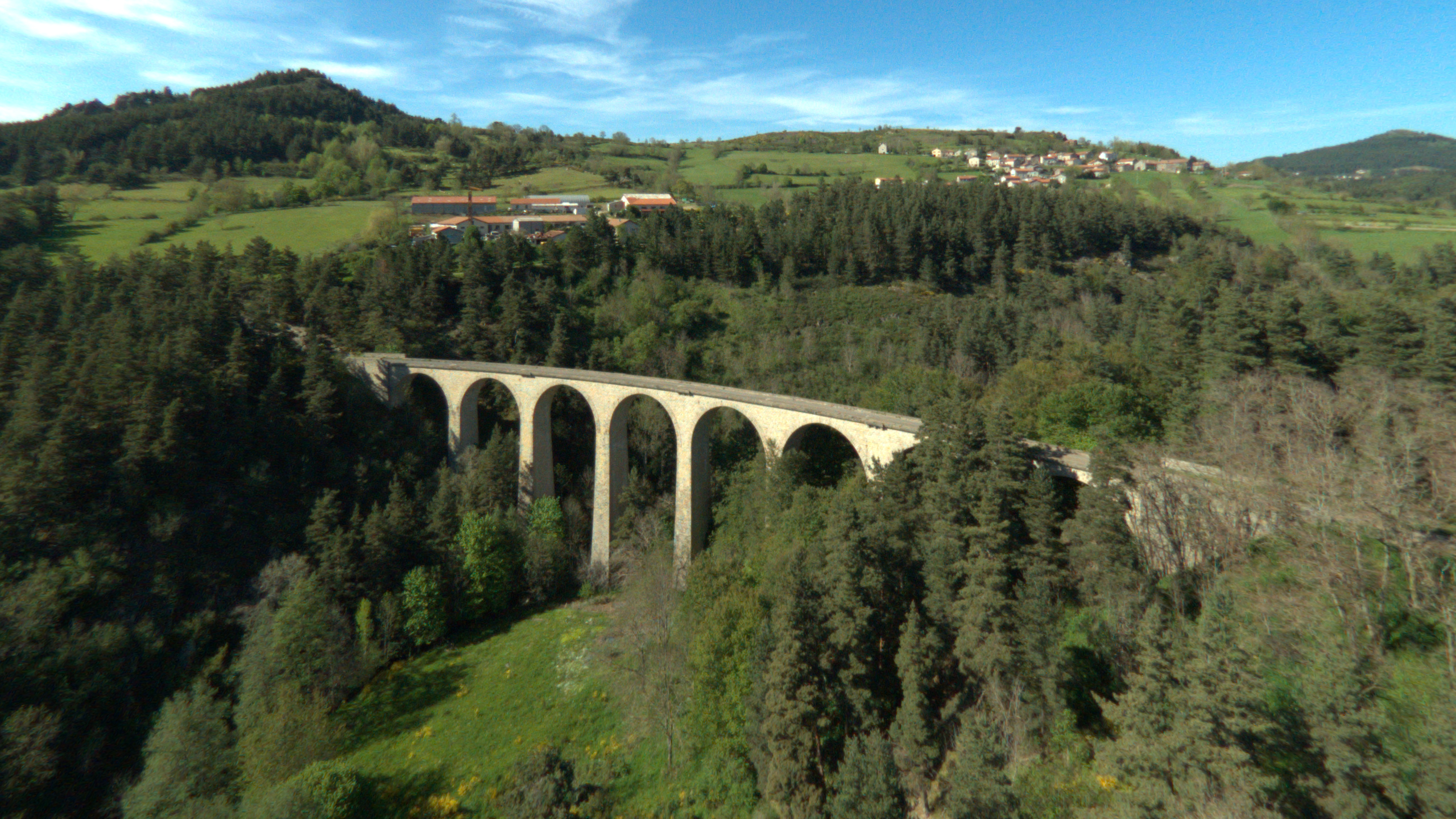 Le viaduc des Badioux (Viaduc de Laussonne) sur la ligne transcévenole.